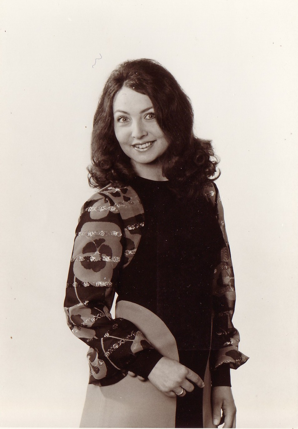 Jeannette van Zutphen. Dit is vrije content beheerd door Willem van Doorn.